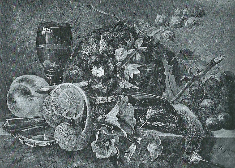 Stilleven door de schilder Martinus Savrij (1793-1871)